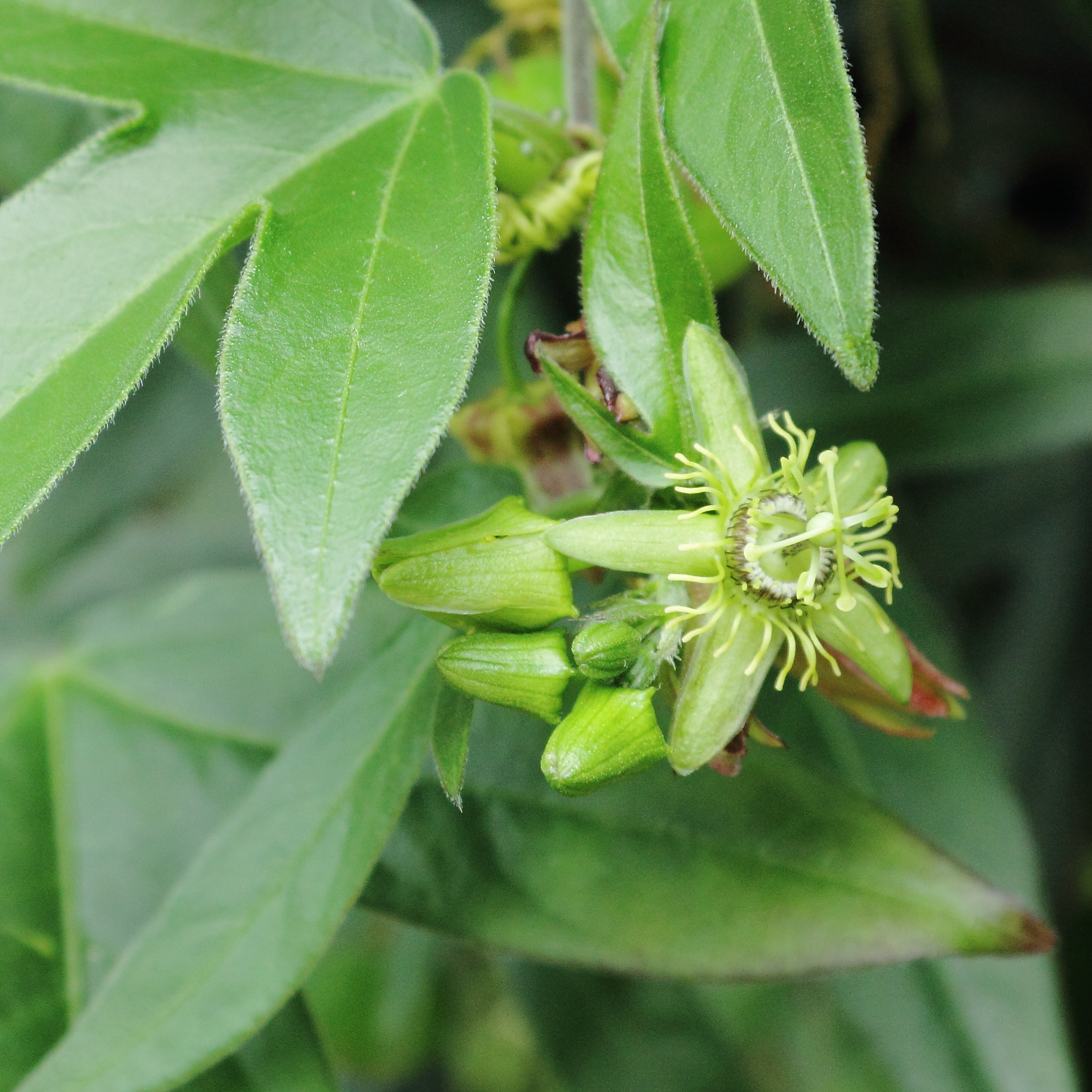 Passiflora sp., identifierad med hjälp av befintlig skylt vid Kew Gardens, London.